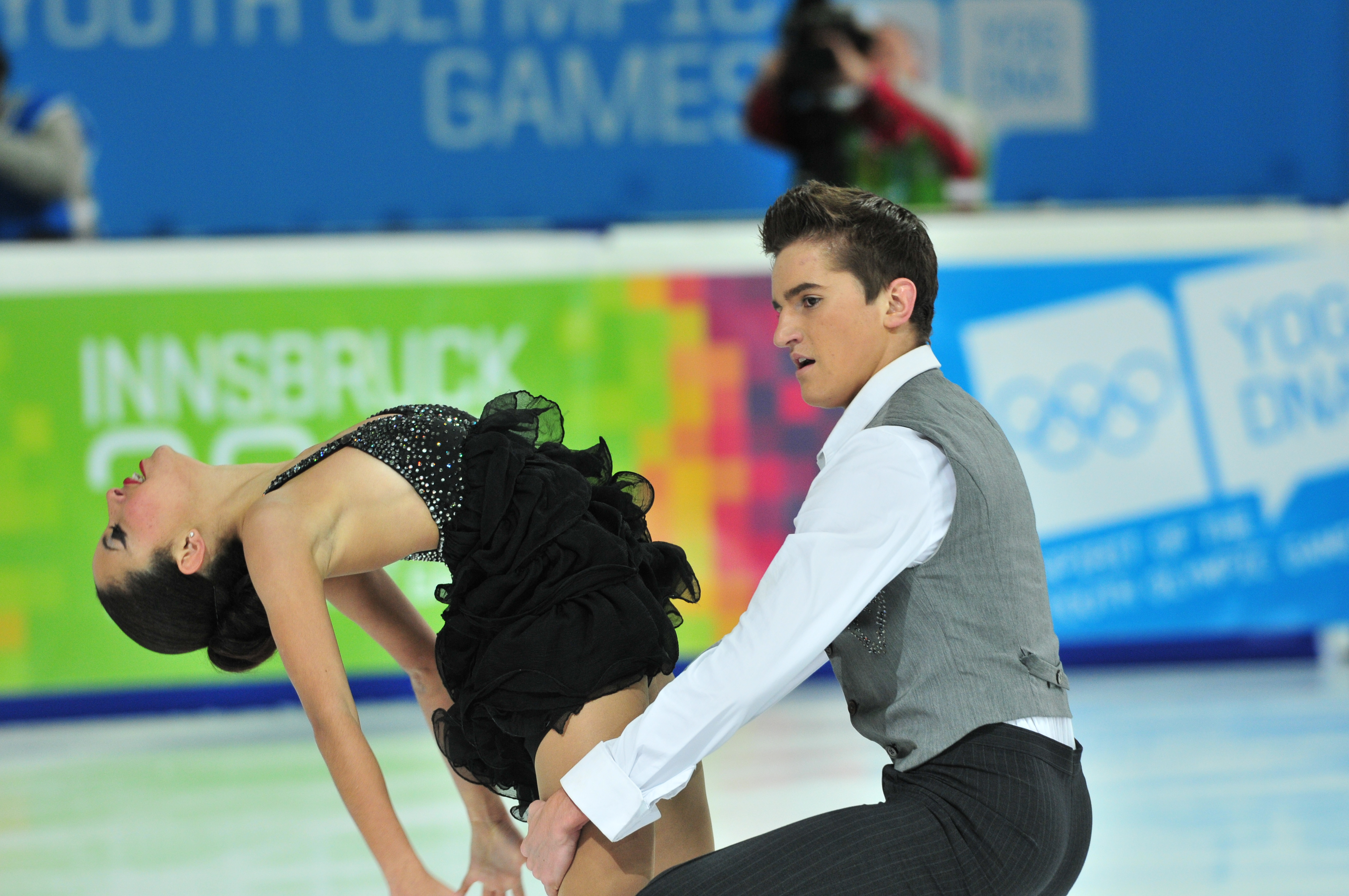 1. Jugendolympiade 2012 Innsbruck